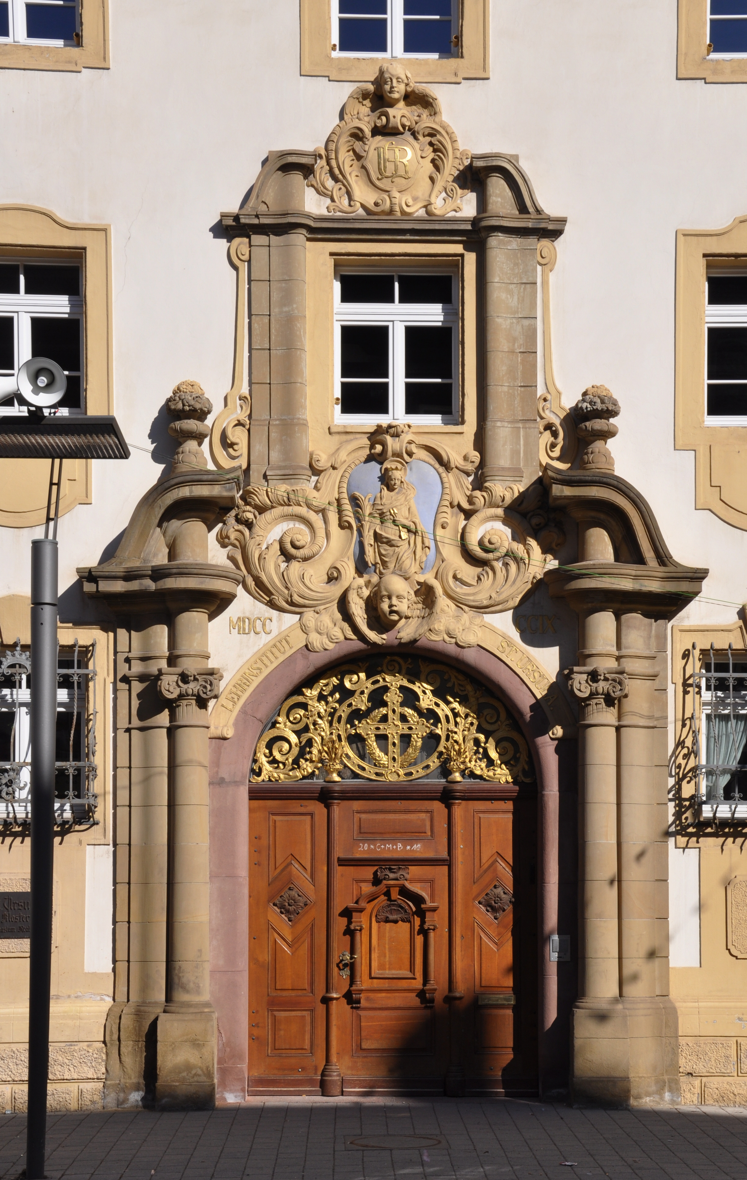 Villingen-Schwenningen, Stadtbezirk Villingen St.-Ursula-Schulen, Eingangsportal an der Bickenstraße